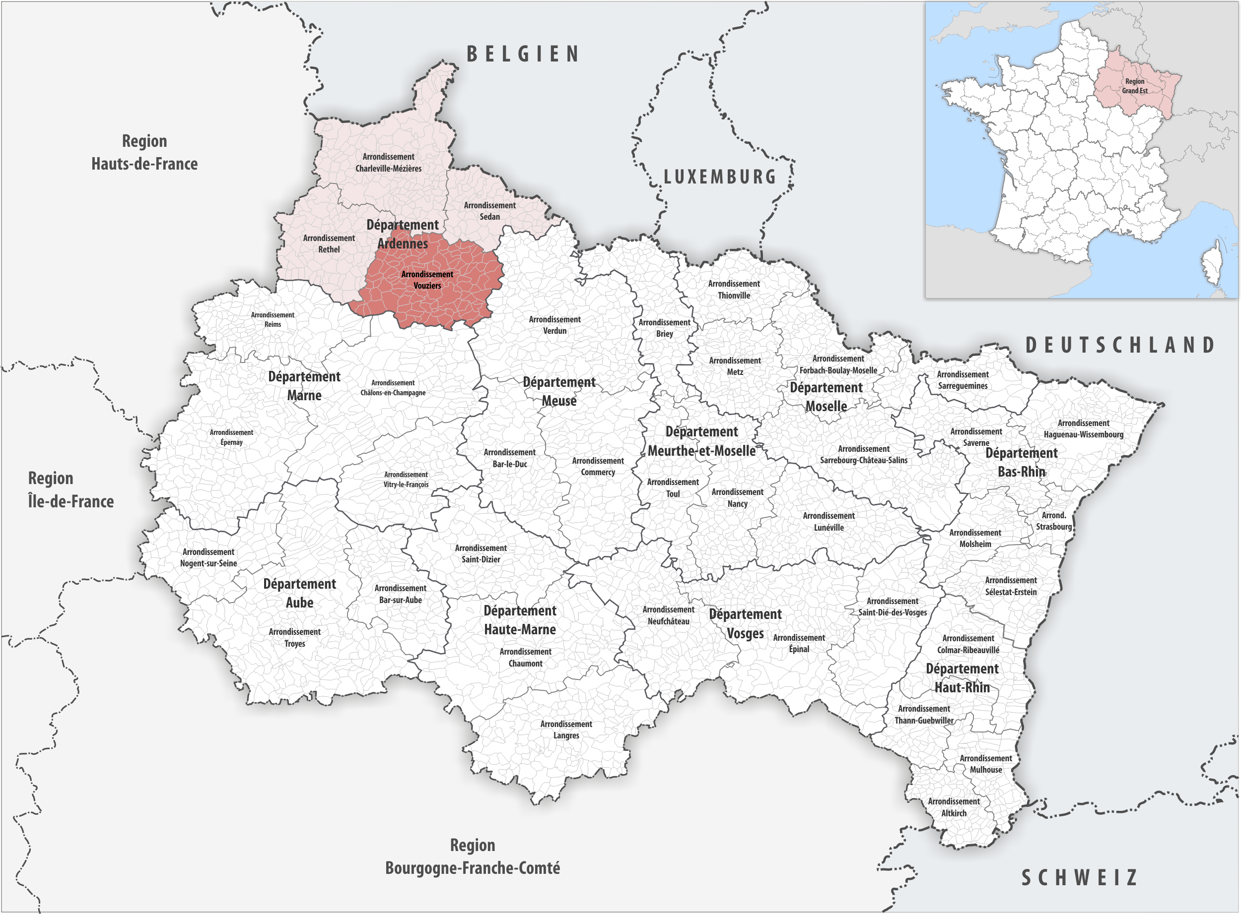 Lage des Arrondissements Vouziers